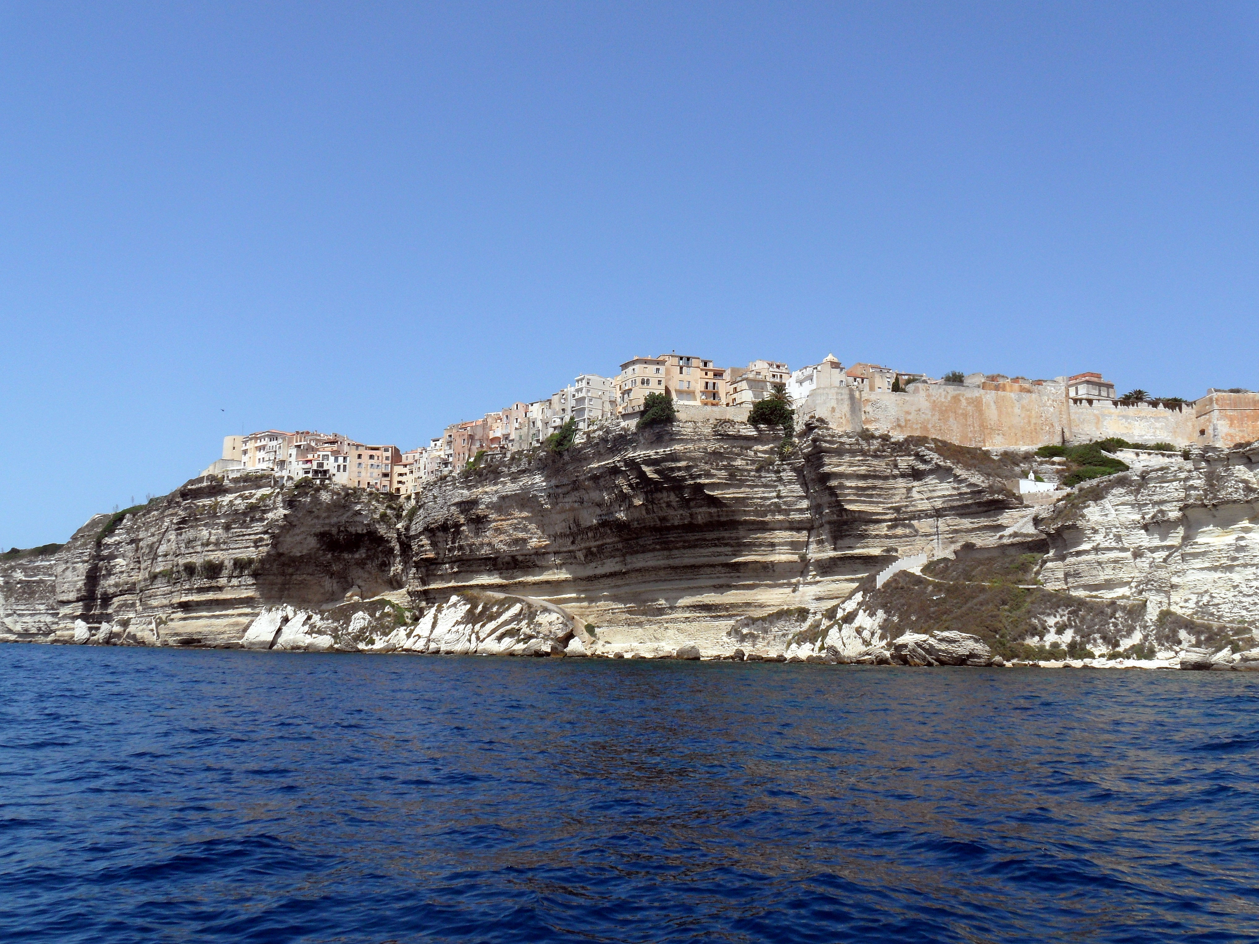 Citadelle de Bonifacio